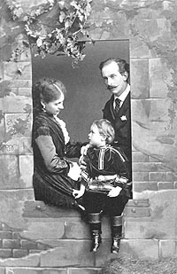 Надежда Сергеевна Акинфьева и герцог Николай Лейхтенбергский с сыном Николаем.